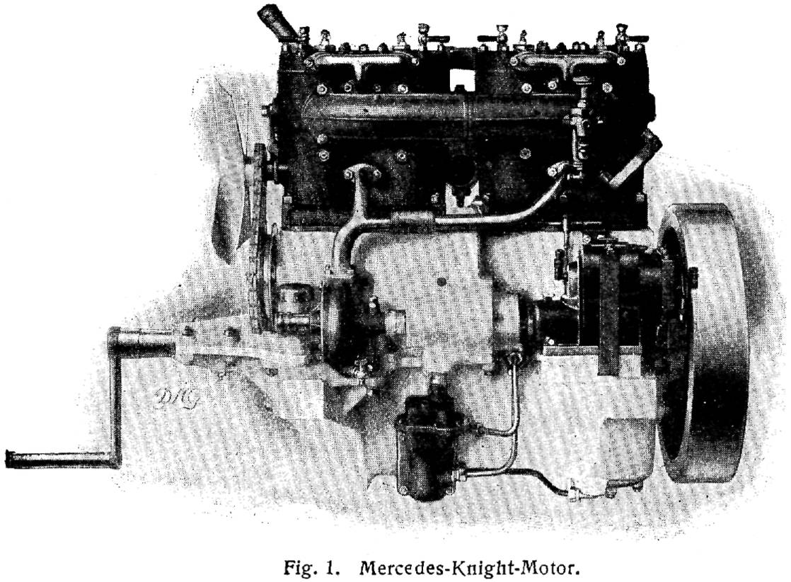 Mercedes Knight Motor